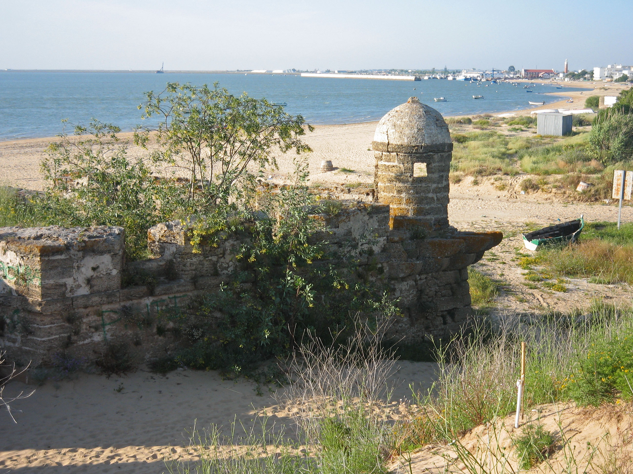 Baluarte de San Salvador, Sanlúcar de Barrameda (Cádiz-Andalucía-España)